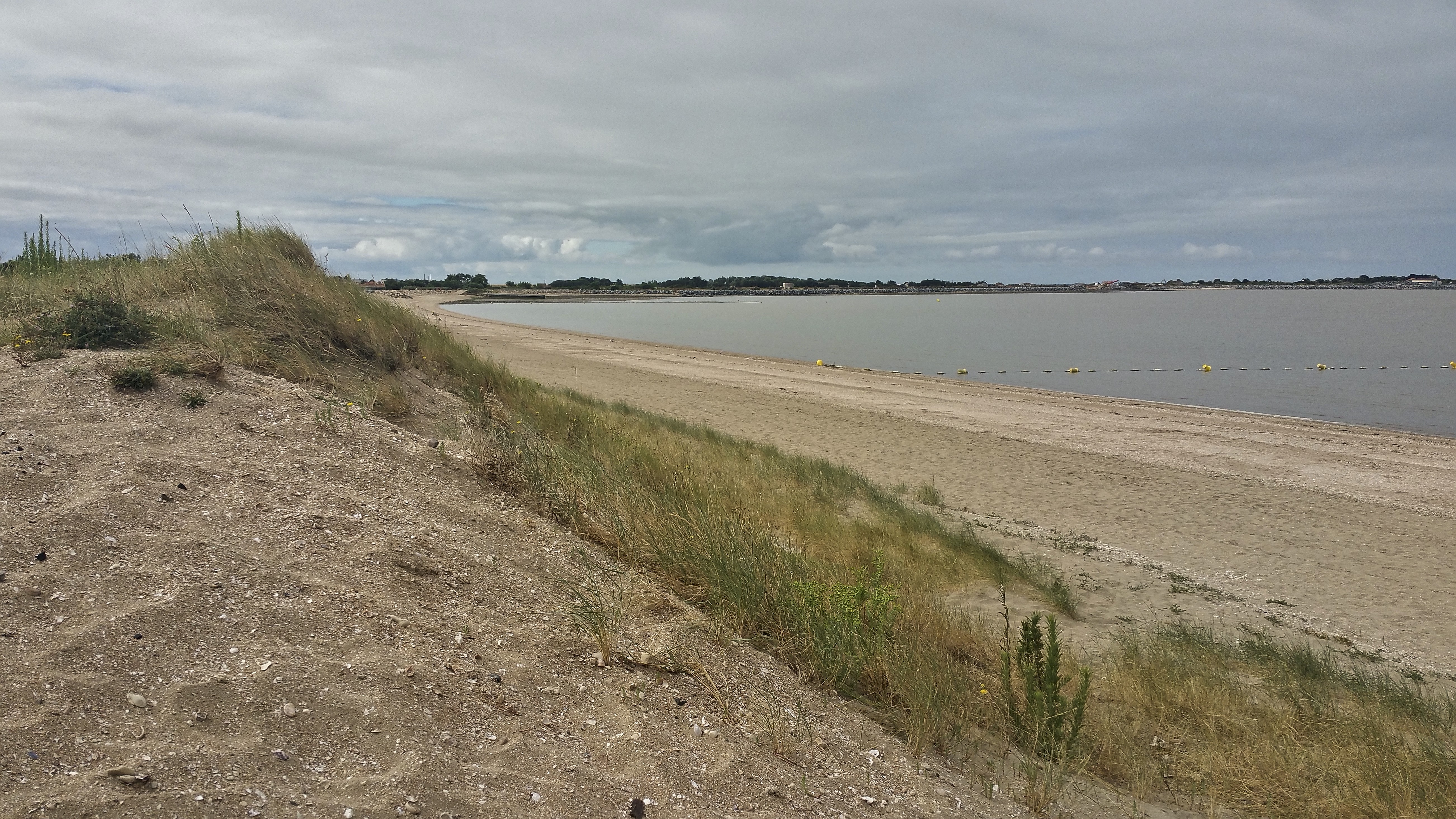 La plage et la dune d'Aytré et la presqu'ile d'Angoulins au fond